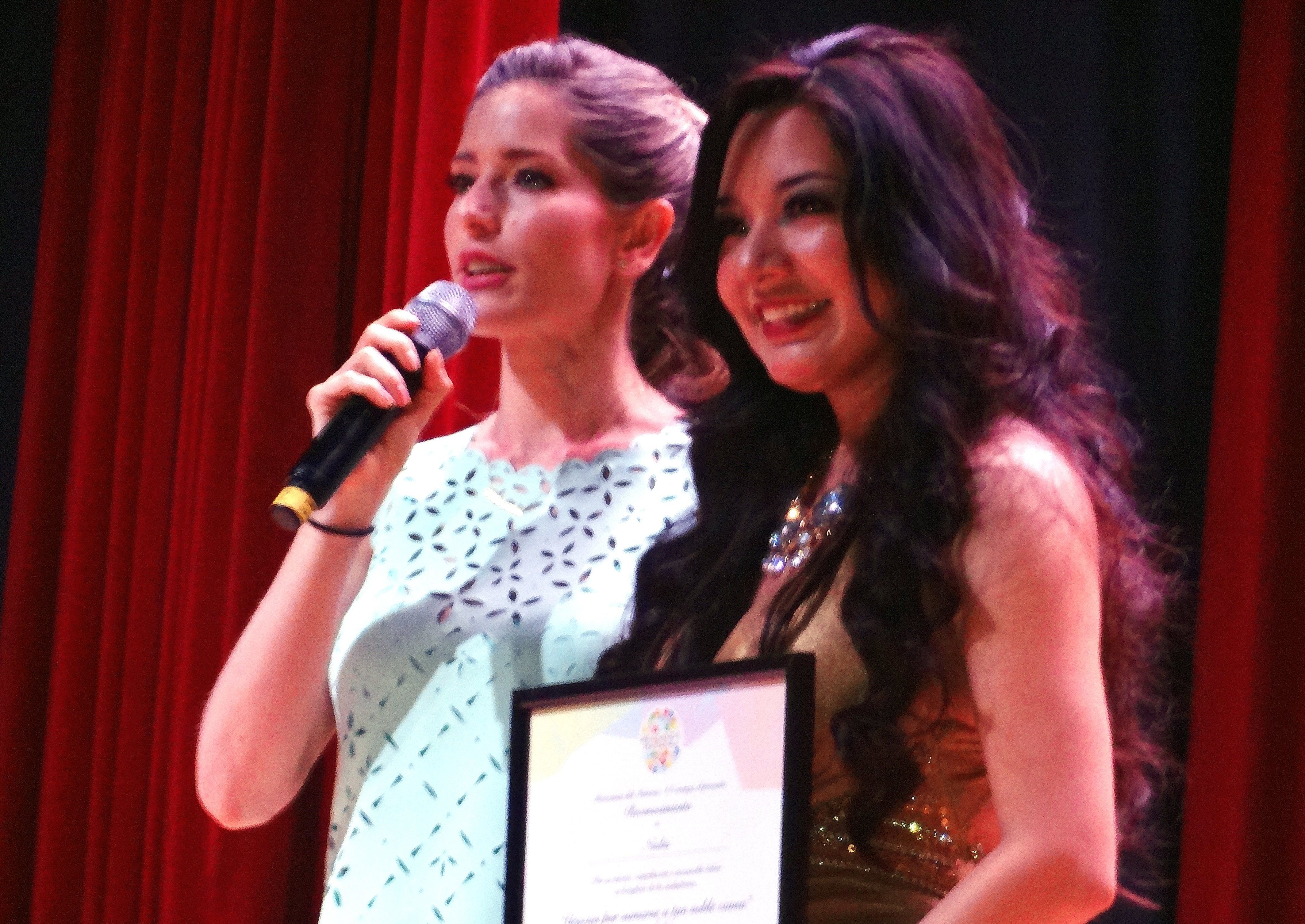 María Inés y Nadia durante el segundo concierto con causa en 2015.